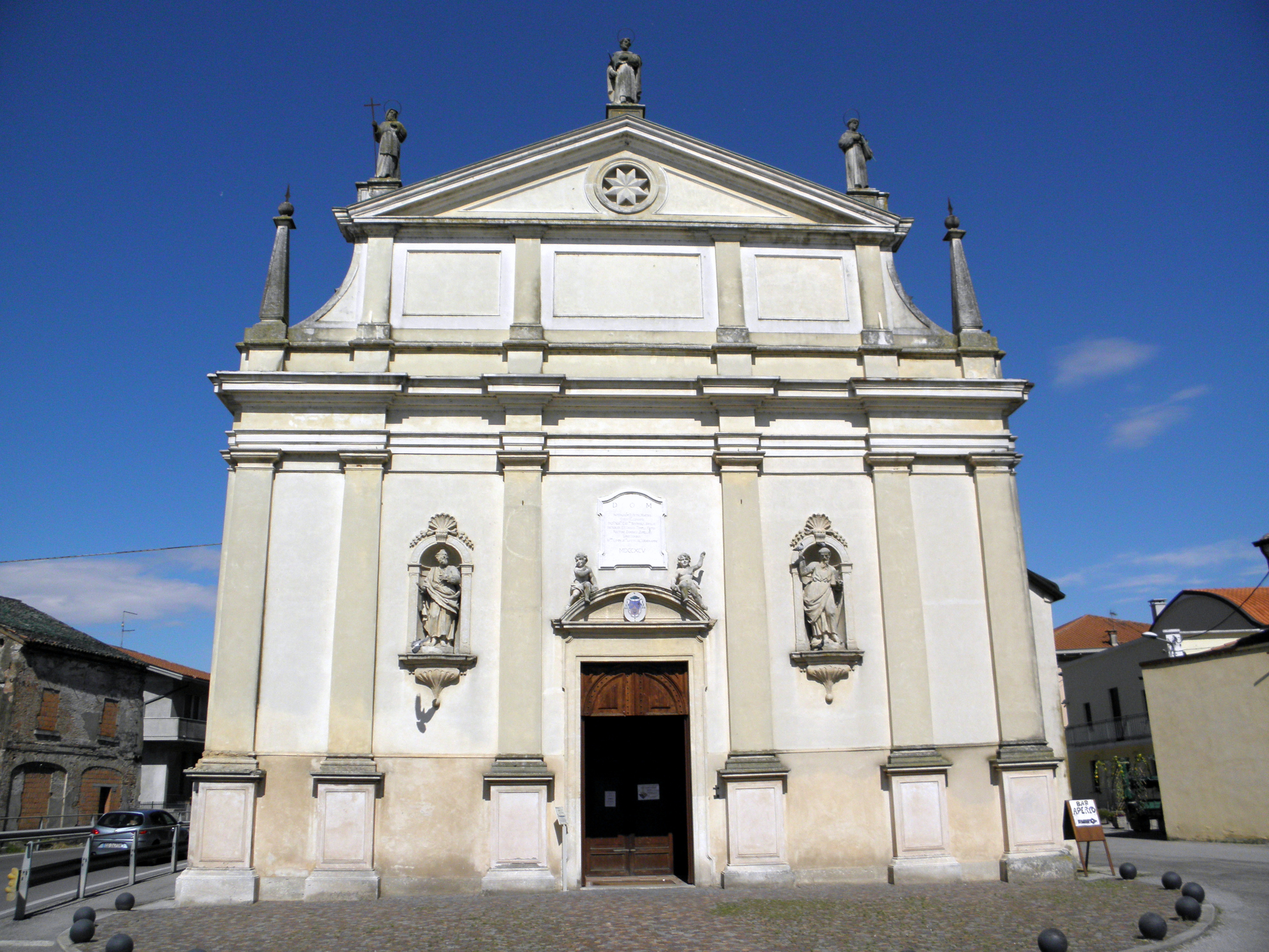 Baruchella, sede municipale del comune di Giacciano con Baruchella: la chiesa parrocchiale di San Pietro martire.